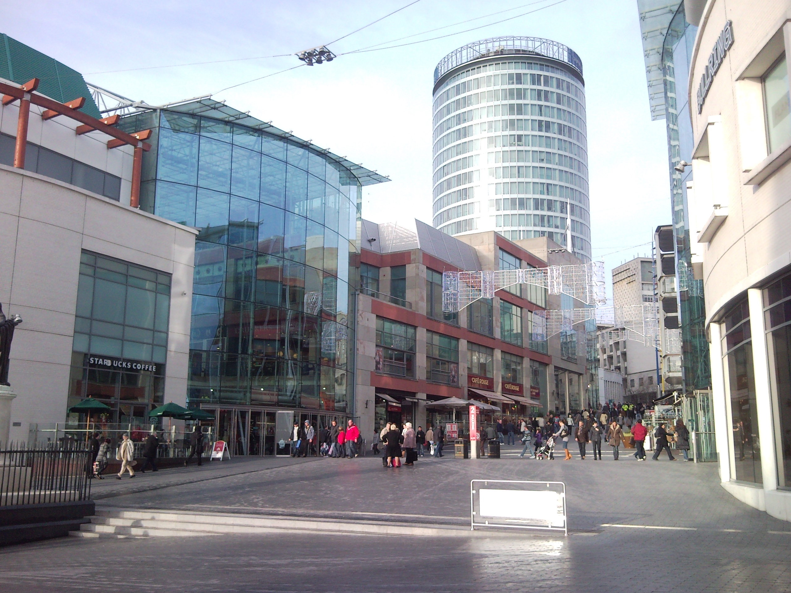 Bullring Mall - Birmingham